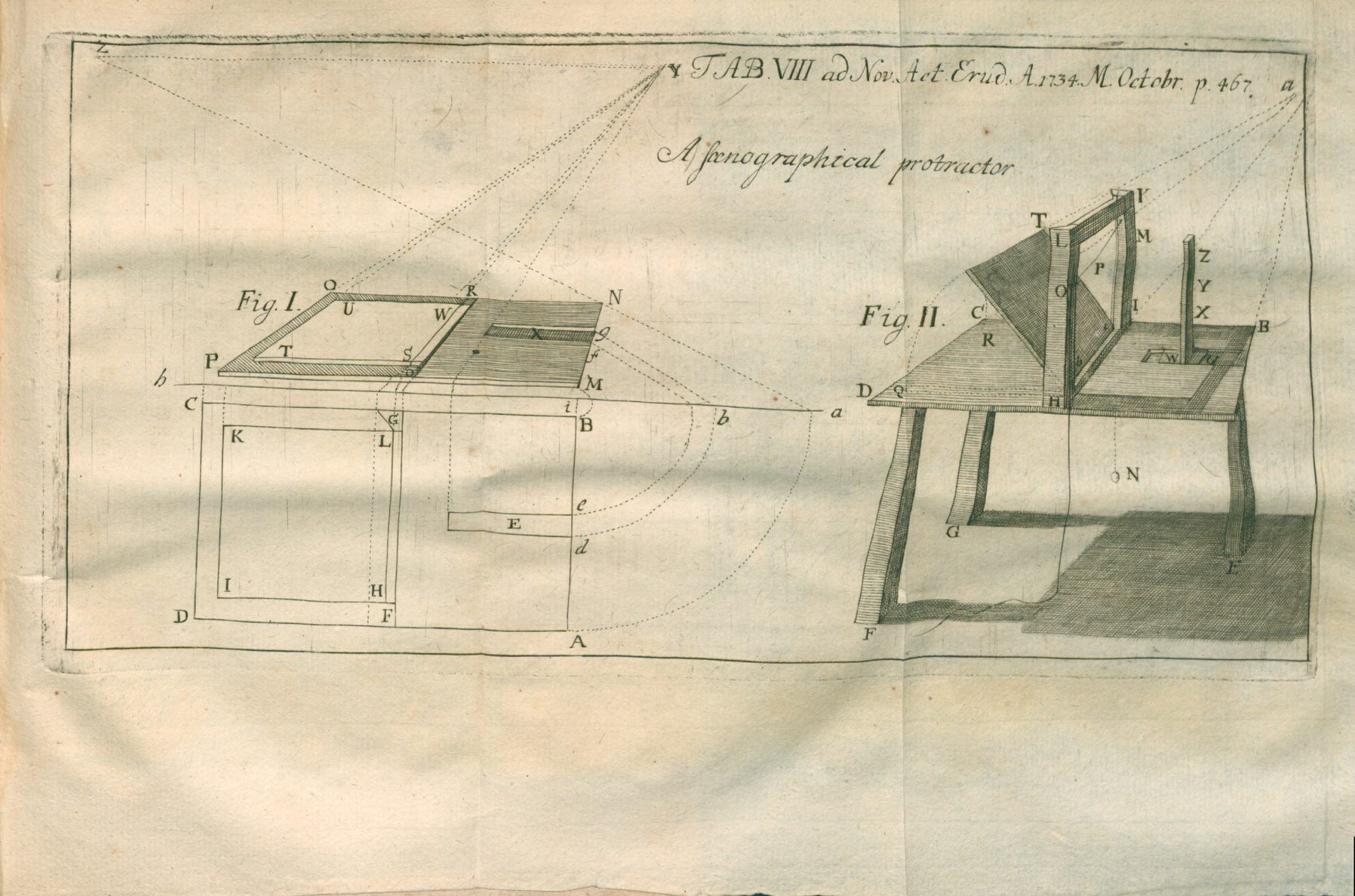 Illustration